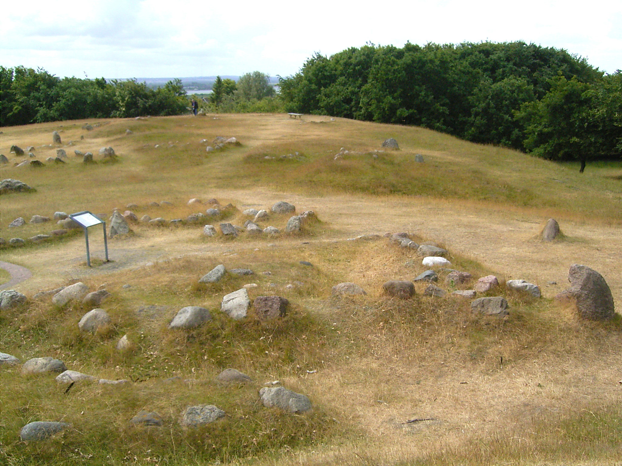 Lindholm Høje, Aalborg, Denmark